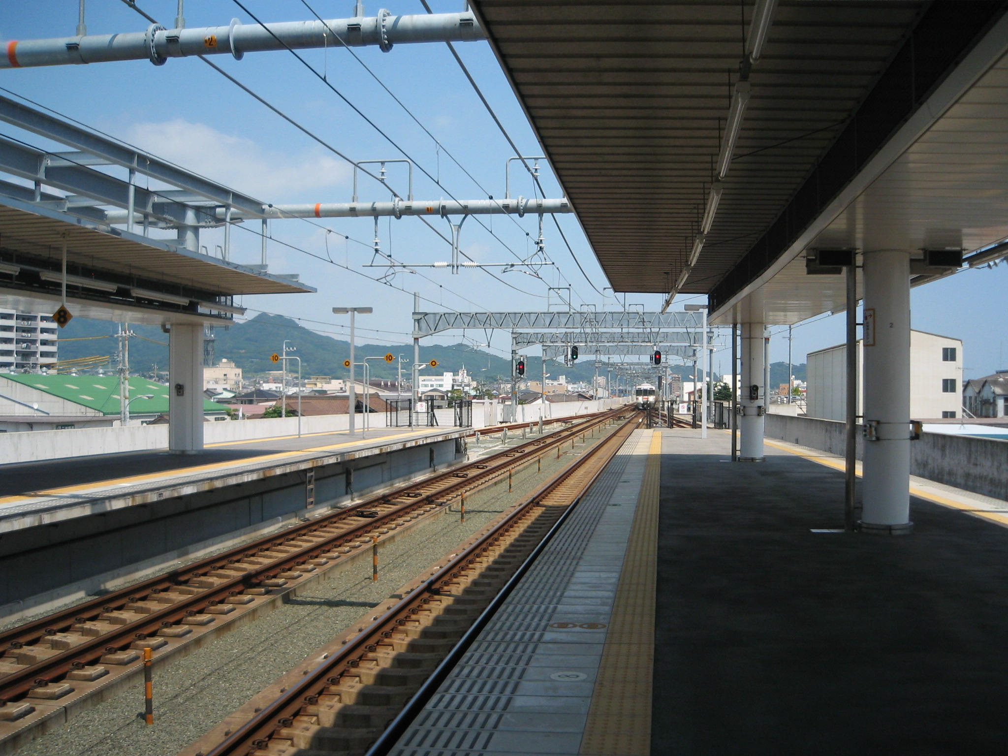 JR Gamagori St.